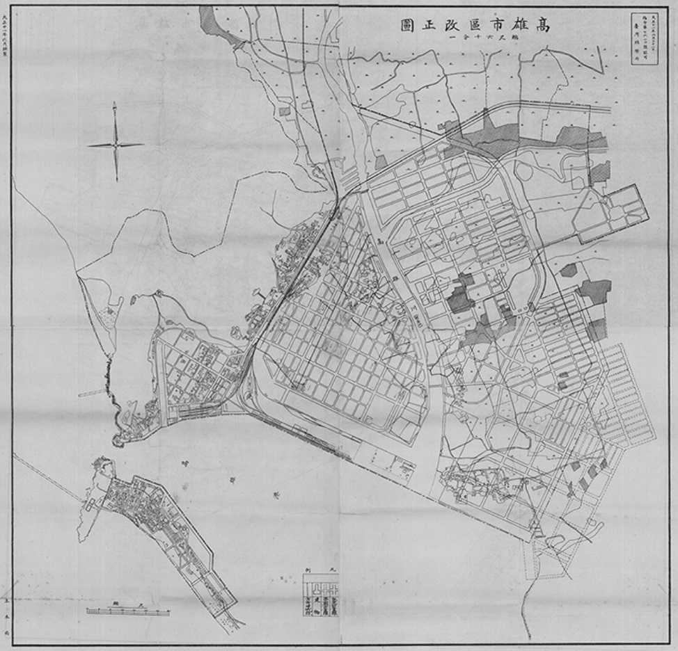 高雄市區改正圖